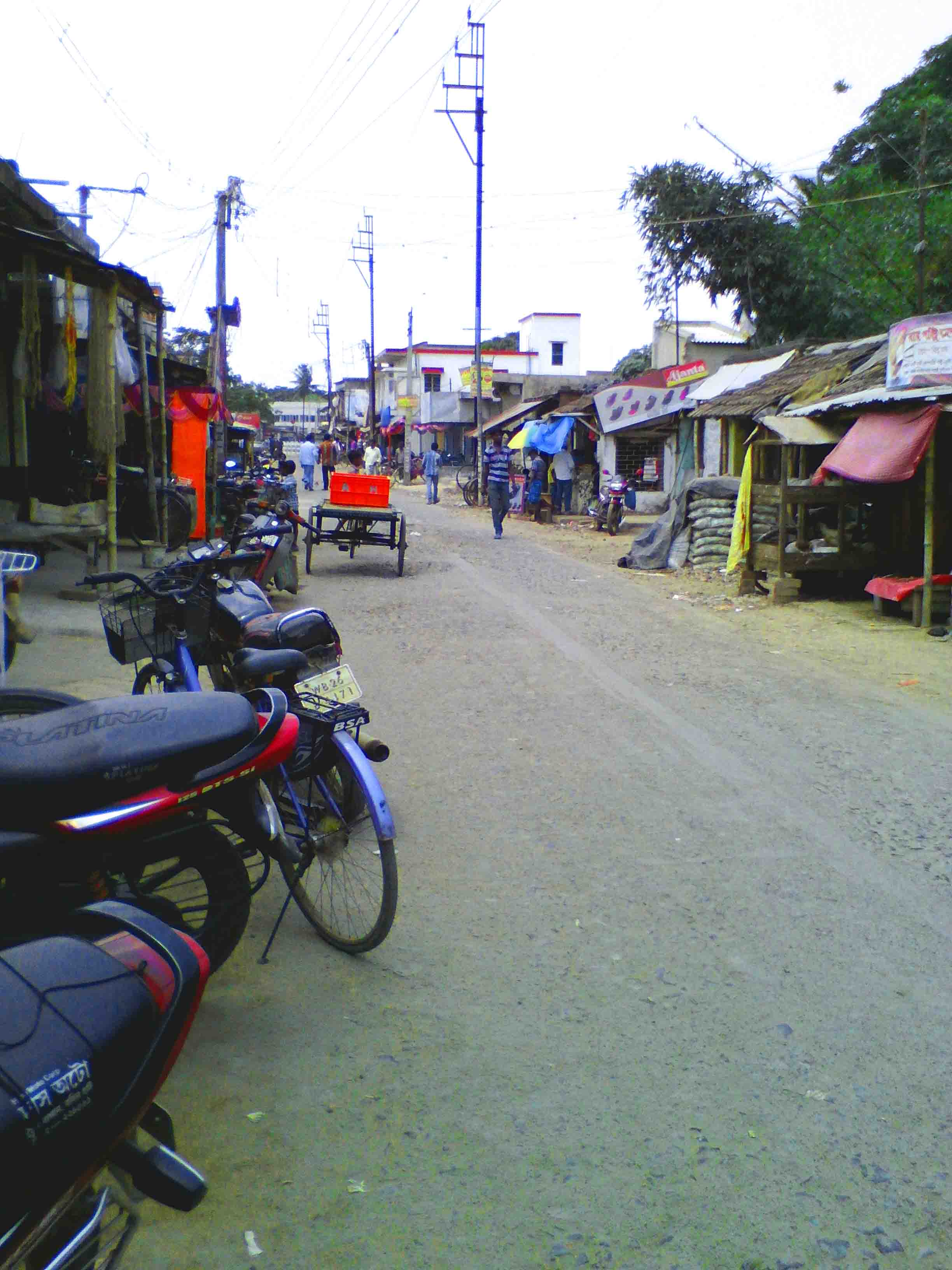 Garakupi Upper Market